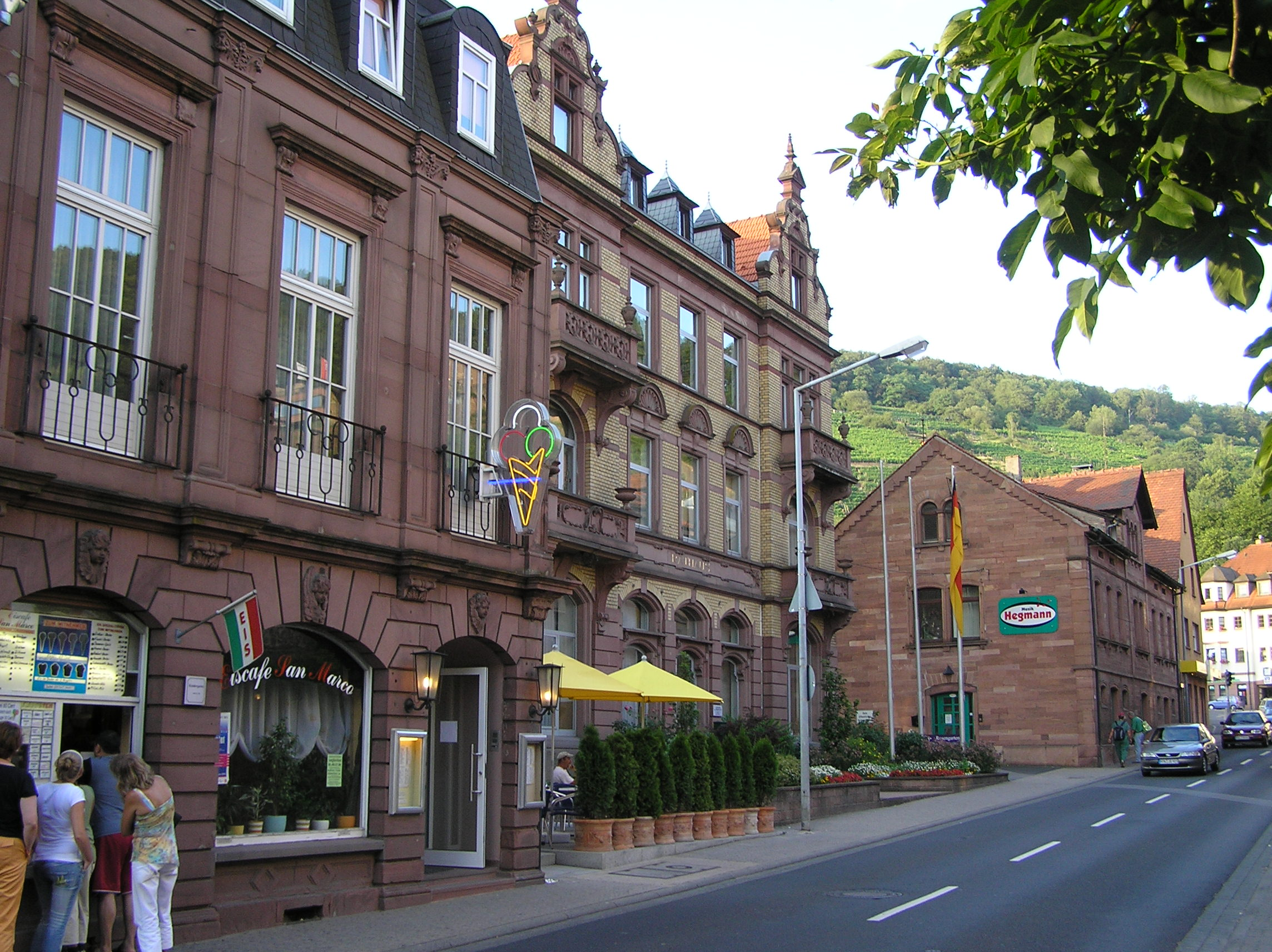 Die Rathausstraße in Klingenberg mit Rathaus (in der Mitte)